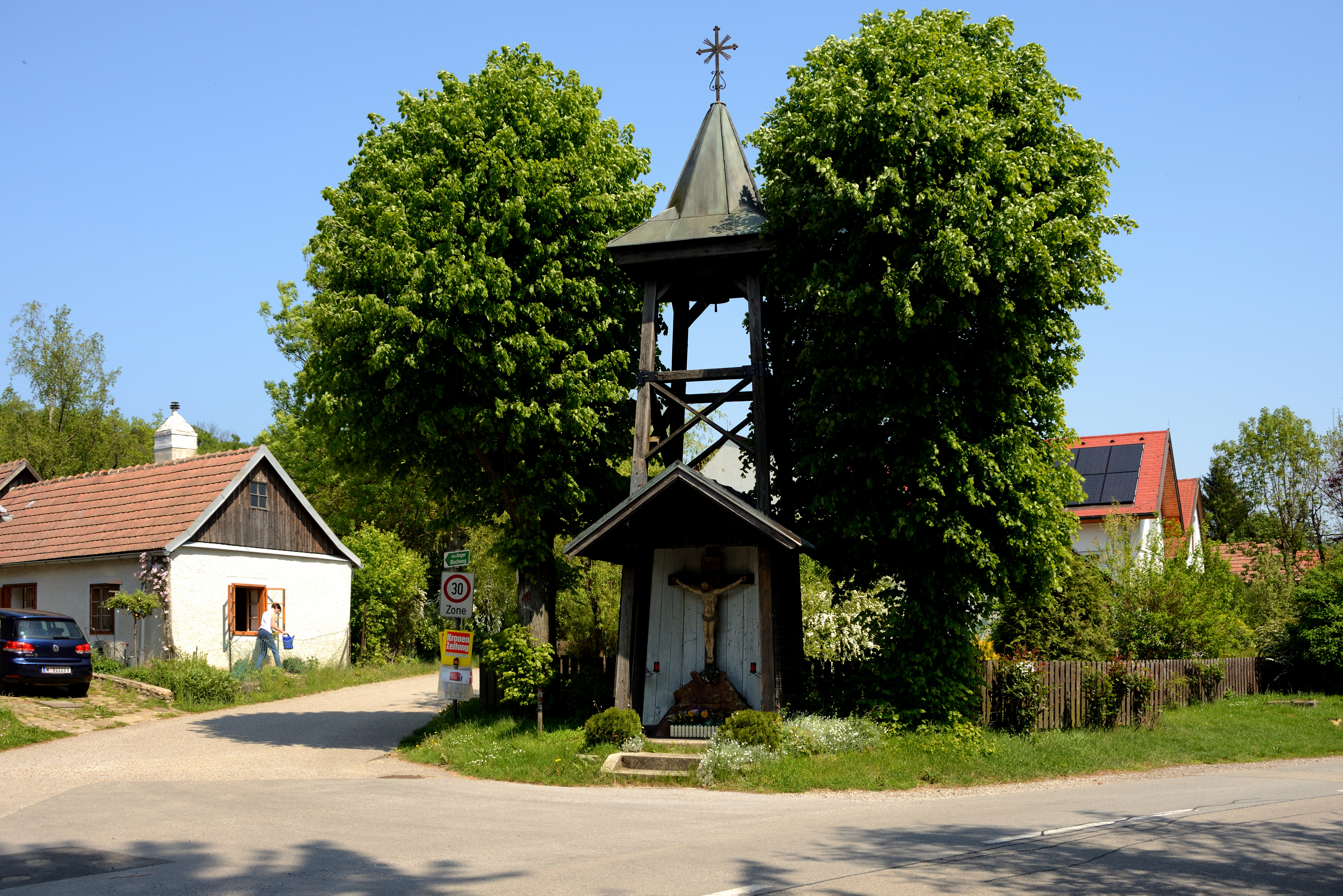 Wegkreuz in Hadersfeld